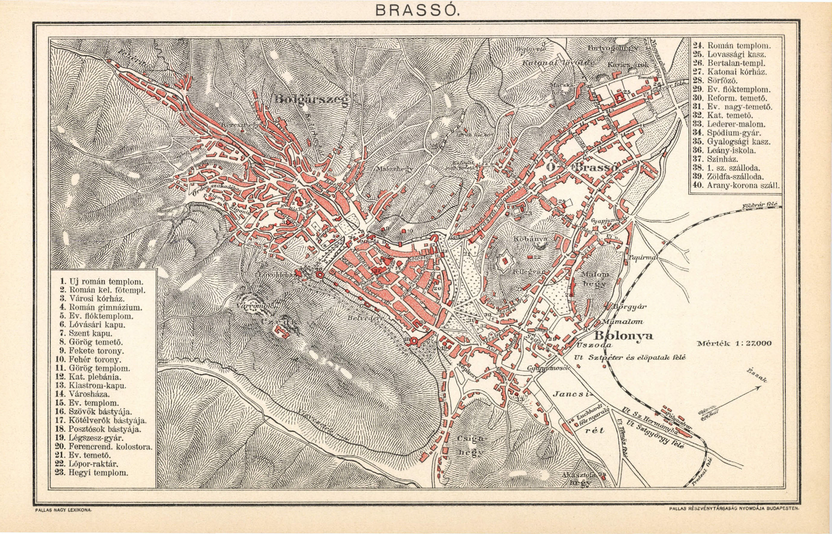 Pallas Nagylexikona, Brasós város térképe